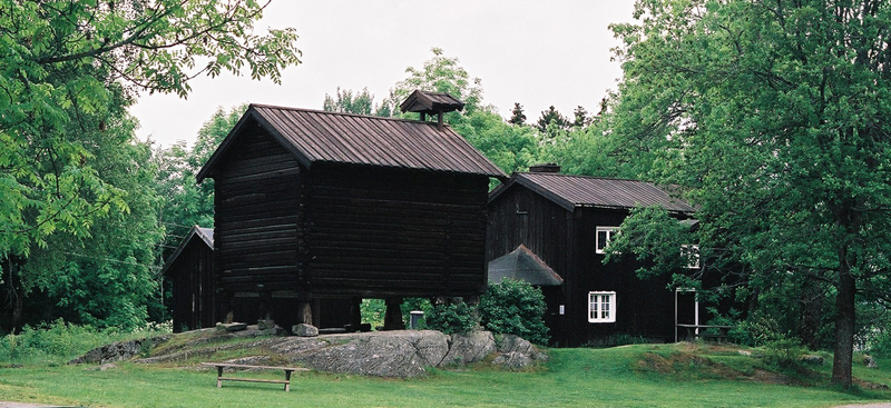 Klokkerenga, Eidsvoll. I dag en del av Eidsvoll bygdetun.